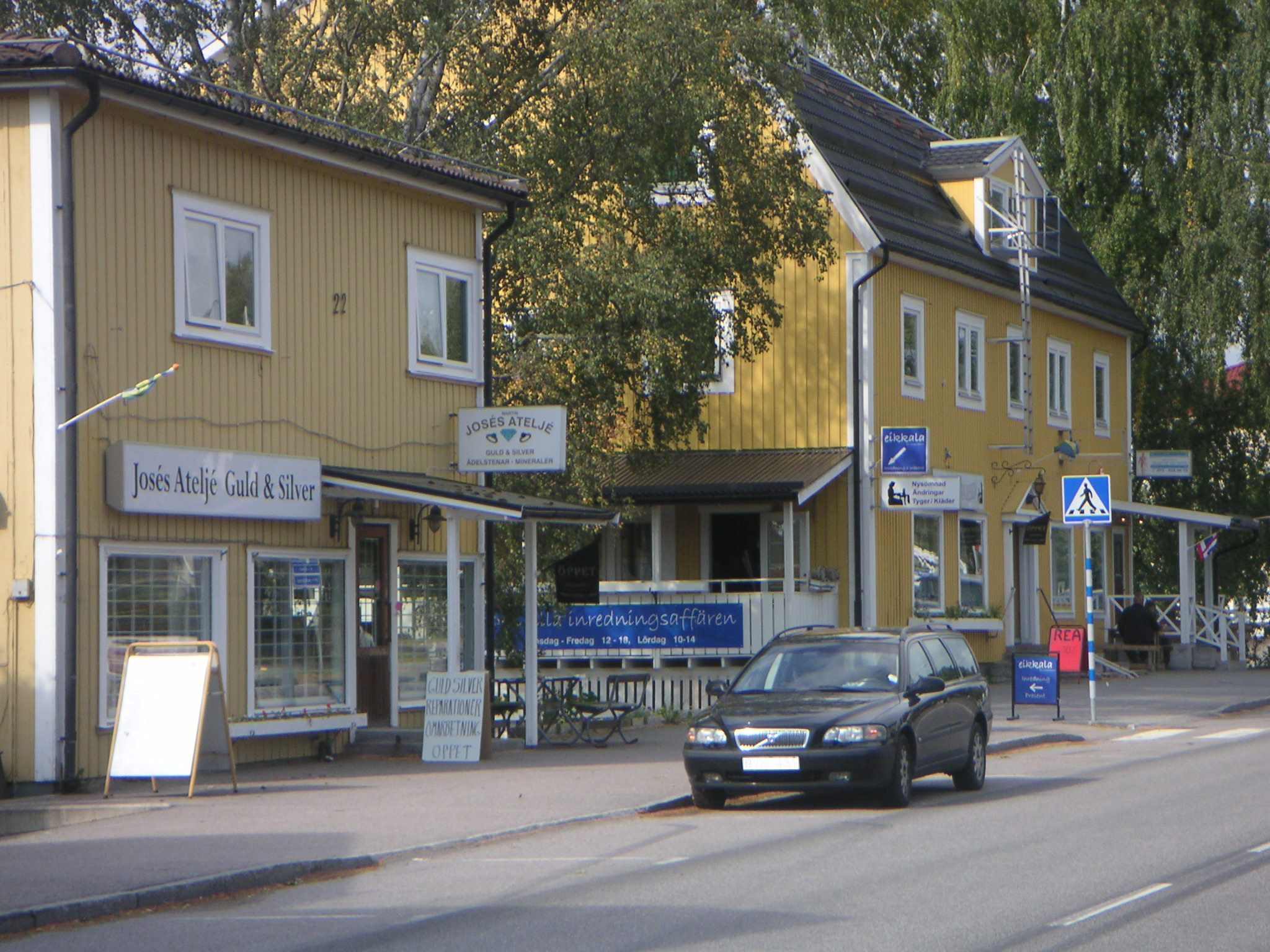 Stockholmsvägen i "gamla" Bålsta.